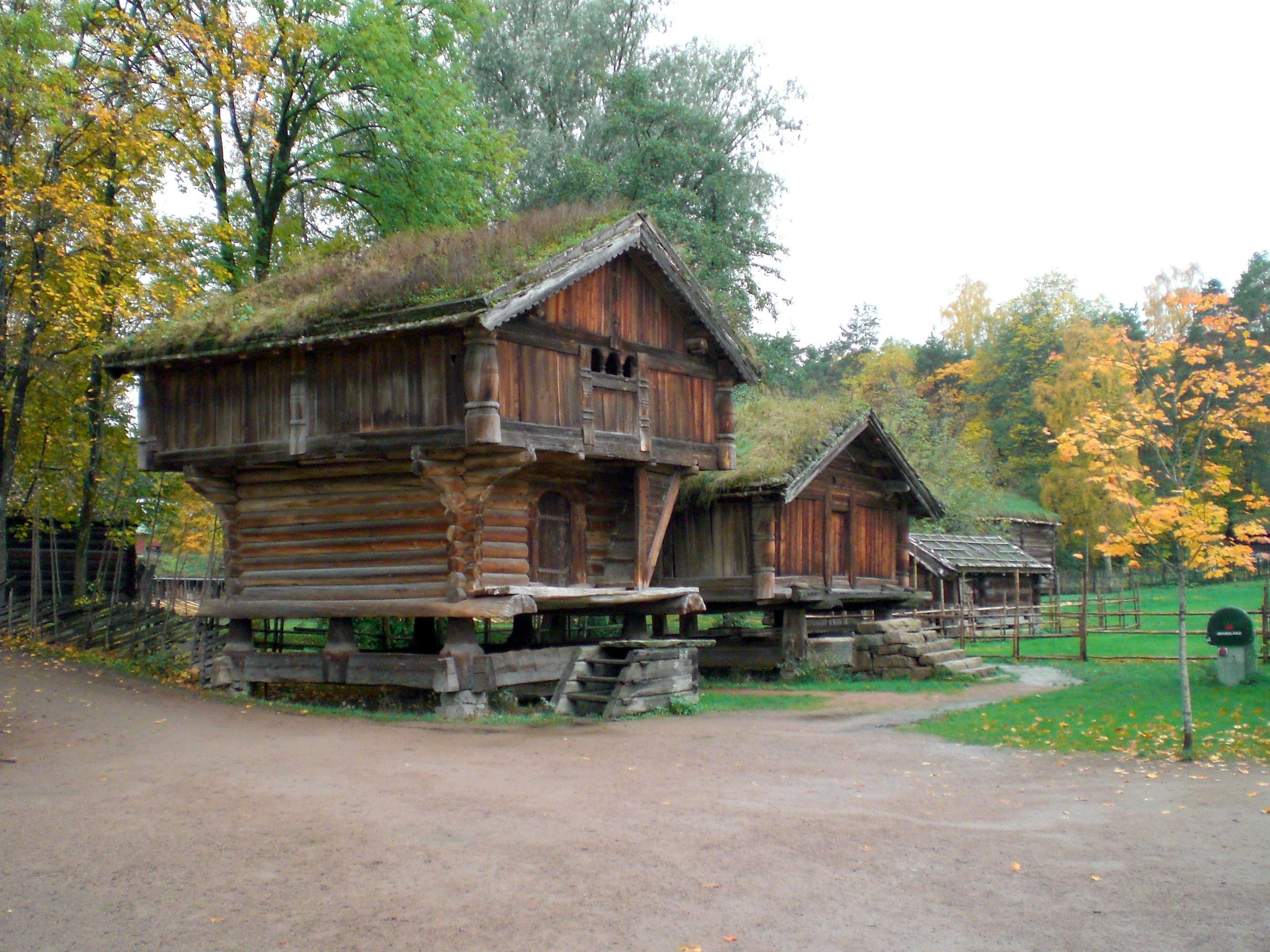 Telemarkstunet på Norsk Folkemuseum. Loft fra Søndre Tveito i Hovin, ca 1300 og bur fra Nedre Nisi, Gransherad, 1797.